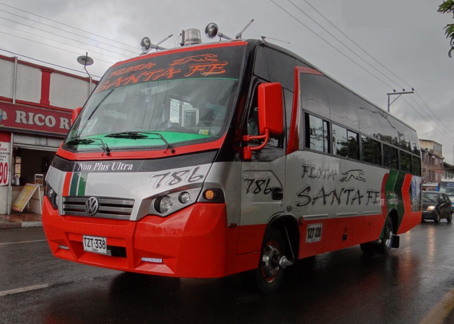 Flota Santafé, empresa de servicio interurbano en Facatativá.